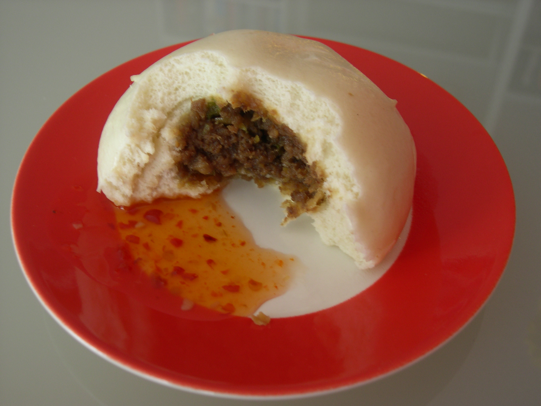 Een bapao van de supermarkt. A Dutch version of bapao (steamed bun with meat) in Holland from the supermarket. Foto gemaakt door Magalhães op nl:16 april nl:2006